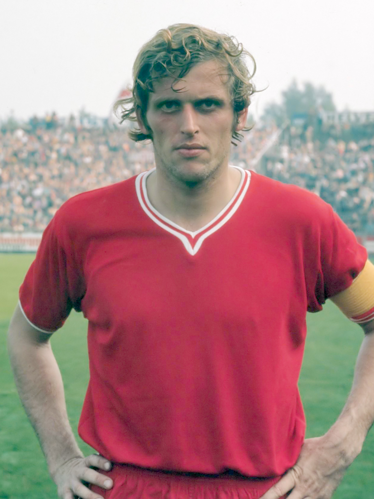 Voetbal; Keizer